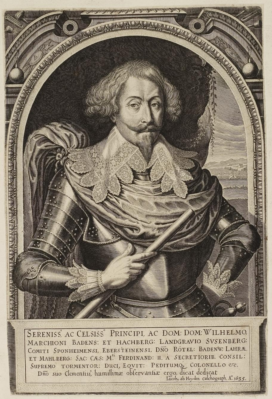 Grafik aus dem Klebeband Nr. 1 der Fürstlich Waldeckschen Hofbibliothek Arolsen Motiv: Markgraf Wilhelm I. von Baden-Baden